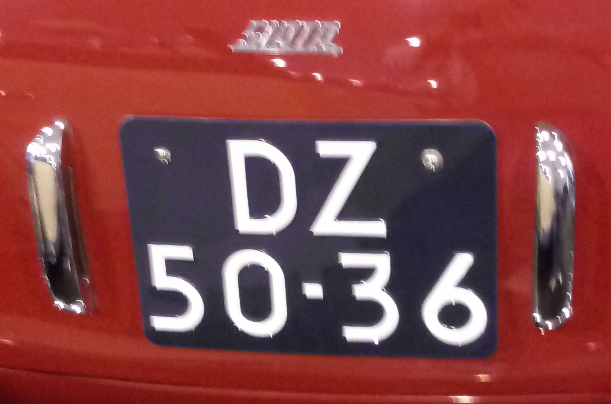 Formato su doppia linea 1951-1973 su Siata-Ford cabriolet. Foto scattata alla fiera di Padova "Auto e moto d'epoca" il 26/10/2019